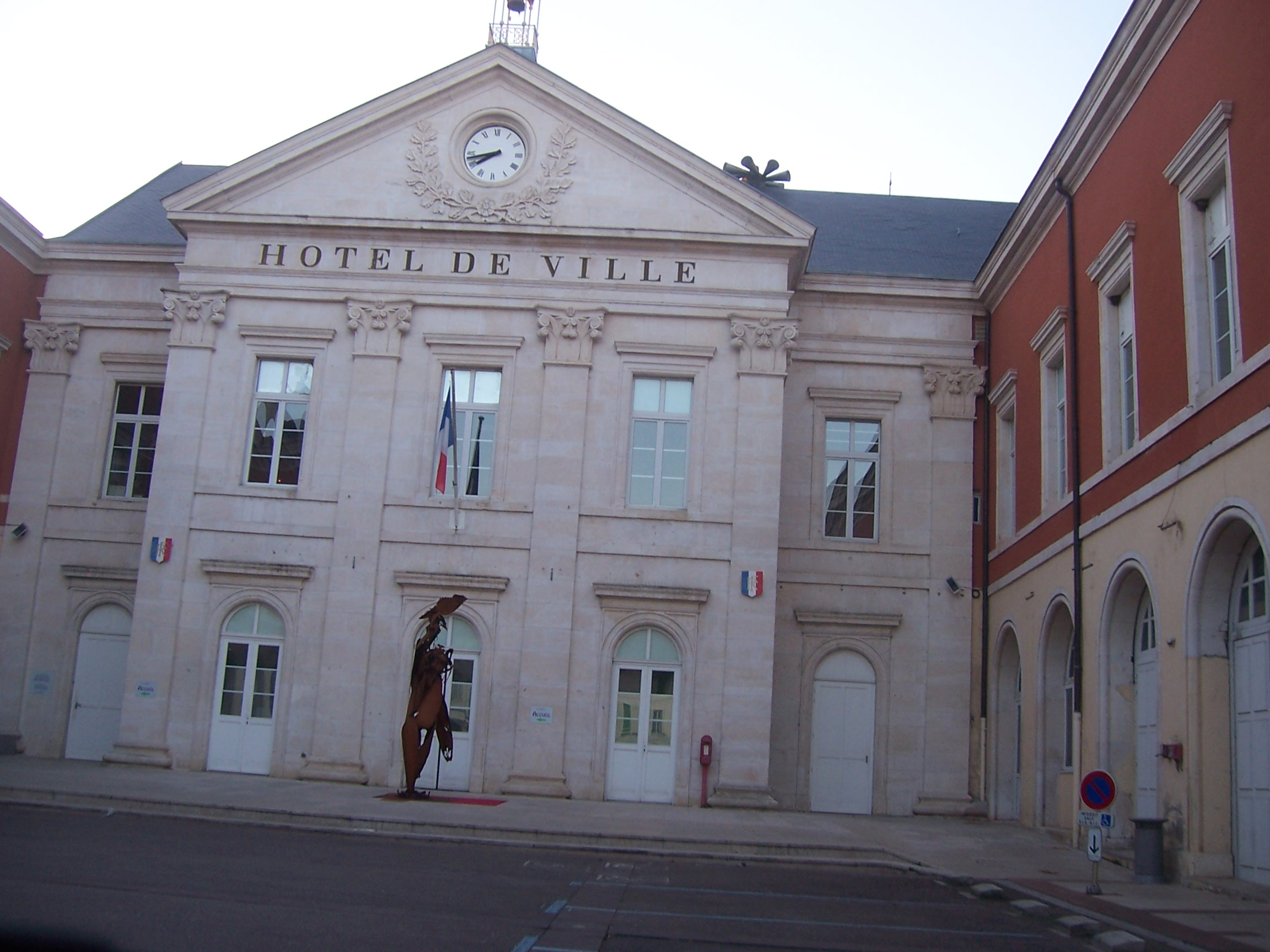 Mairie de Chagny